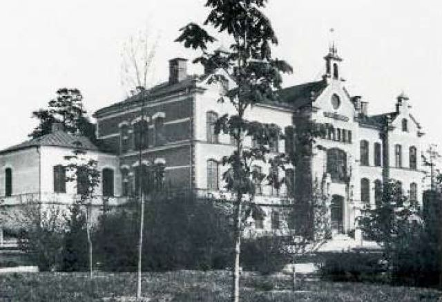 Solna sjukhem, Lilla Alby, Sundbyberg